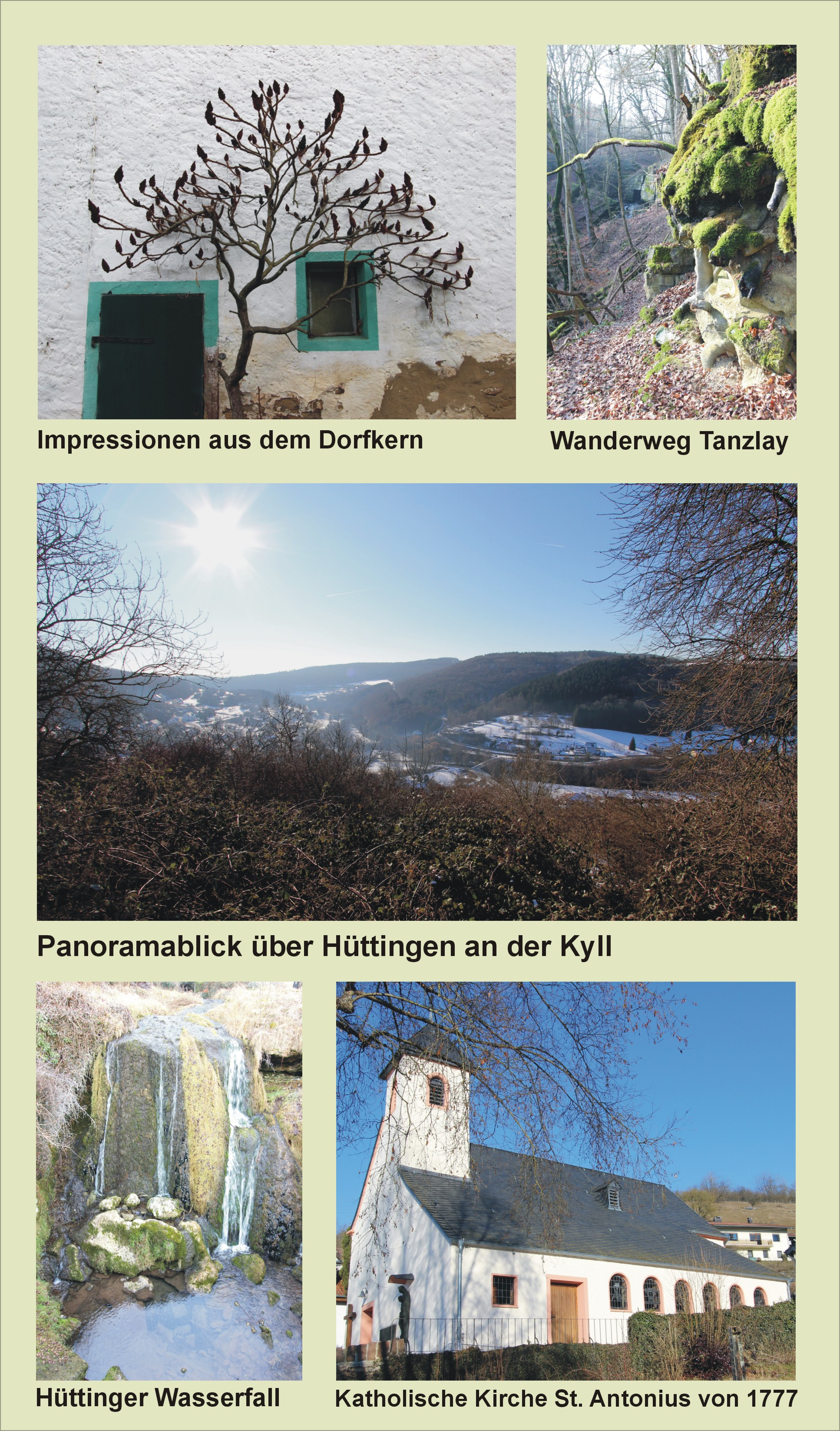 54636 Hüttingen a. d. Kyll; Sehenswürdigkeiten in und um Hüttingen an der Kyll. Aufnahmen von 2017.